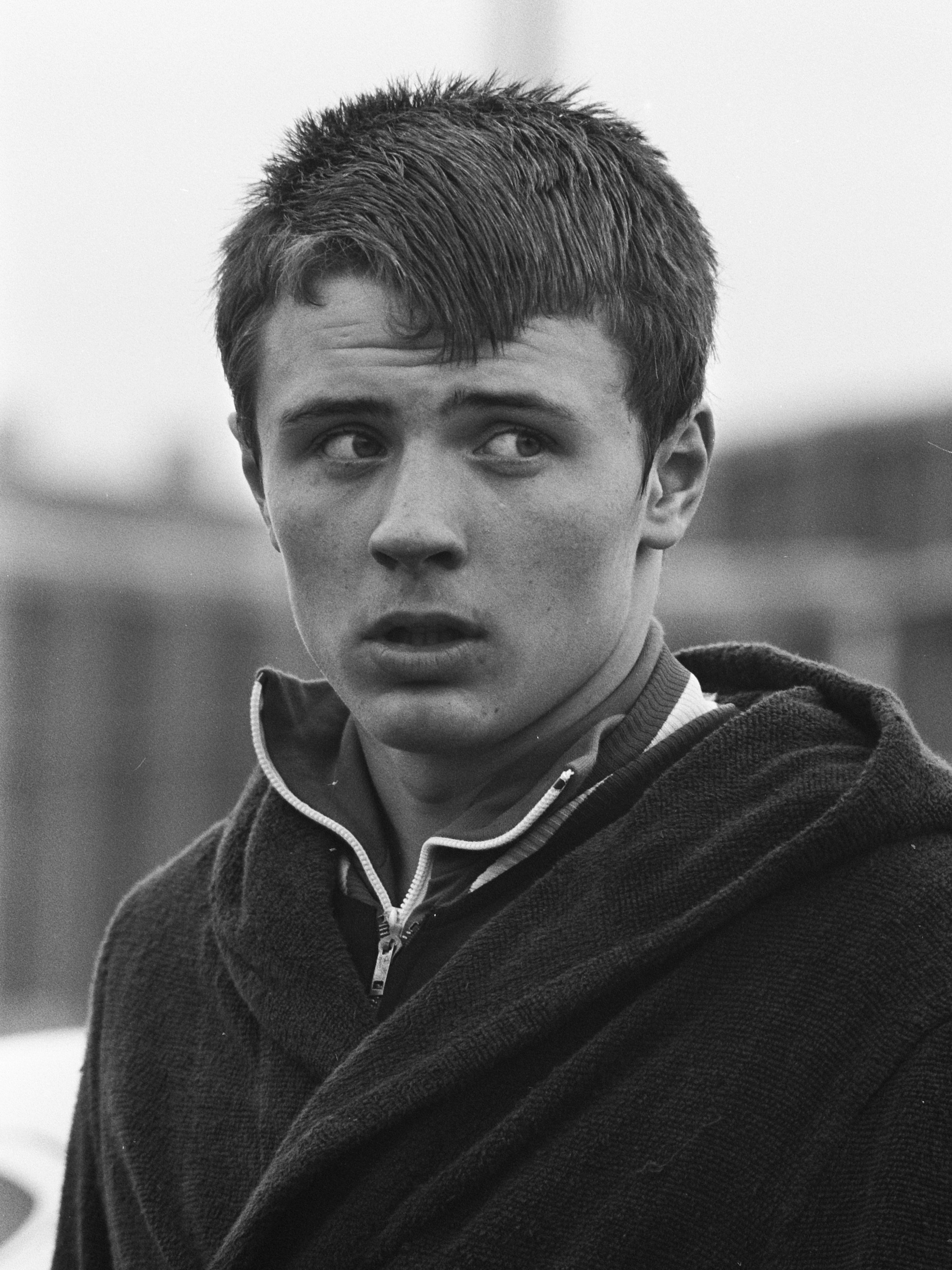 Europese jeugdkampioenschappen zwemmen Rotterdam, András Hargitay